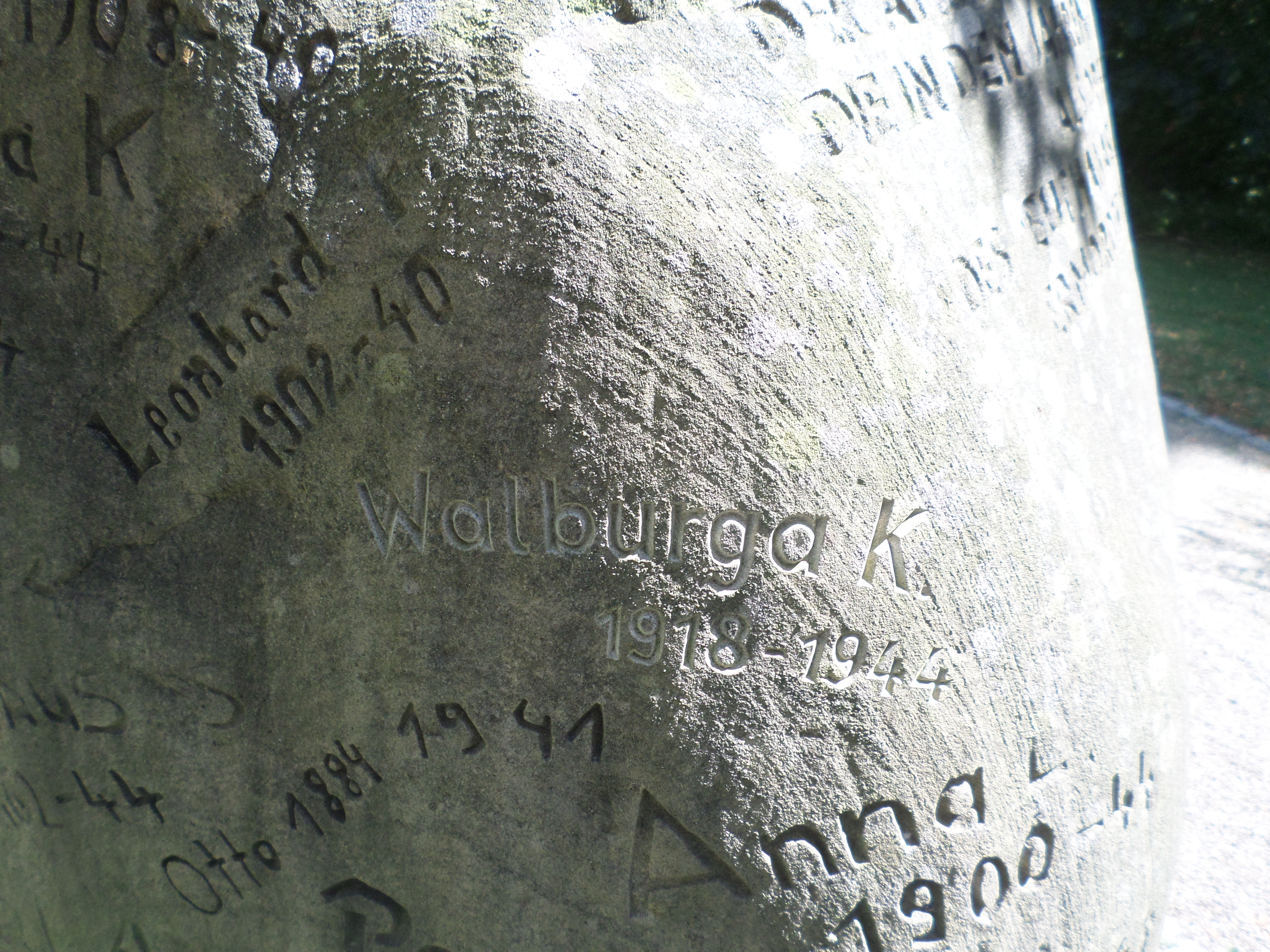 Gedenkstein an die über 2000 Euhanasieopfer der Heil-und Pflegeanstalt Kaufbeuren-Irsee in Kaufbeuren , Bezirkskrankenhaus Kaufbeuren